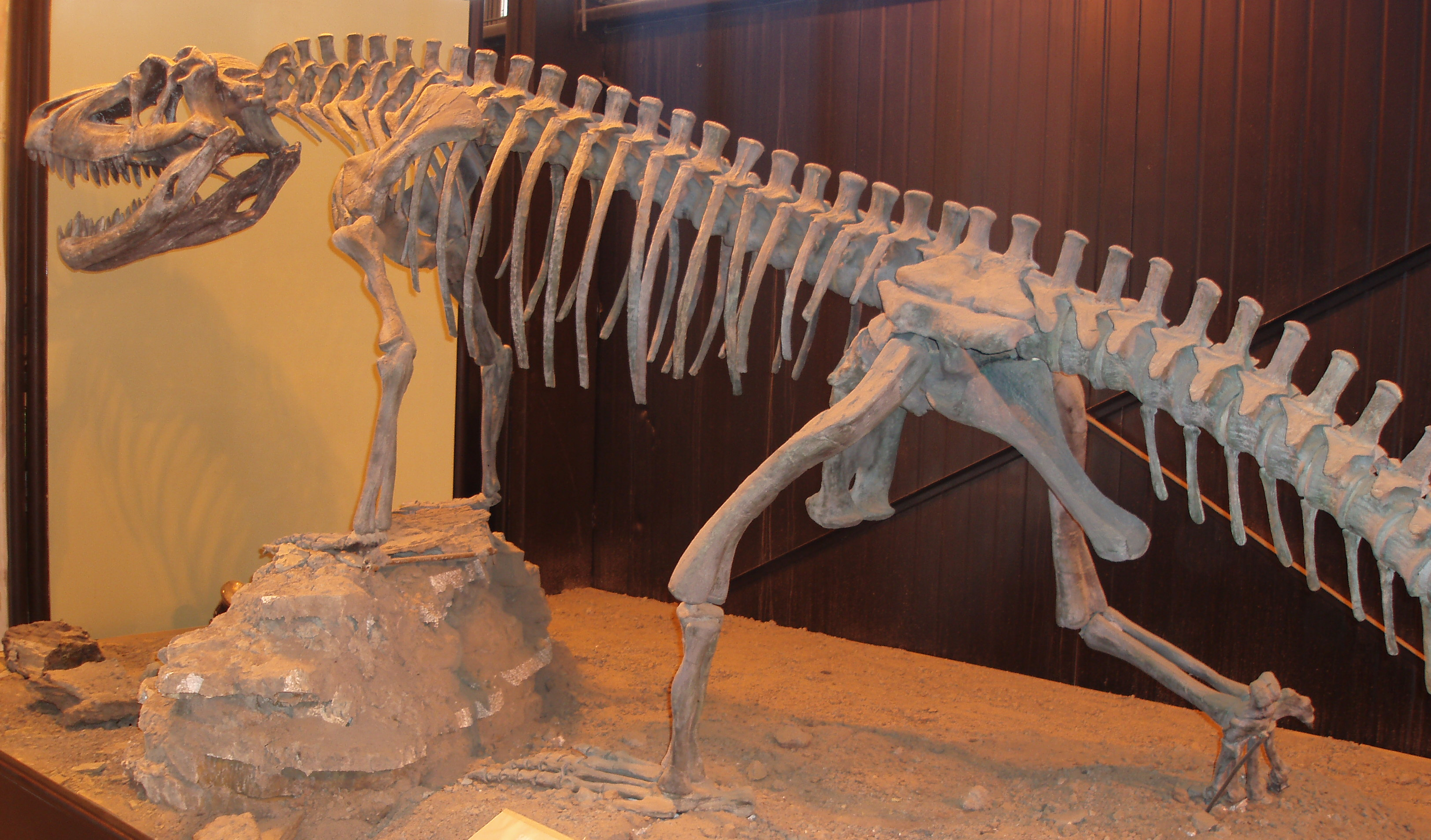 réplica del esqueleto de Saurosuchus galilei, Centro de visitantes del Parque Provincial Ischigualasto, Argentina